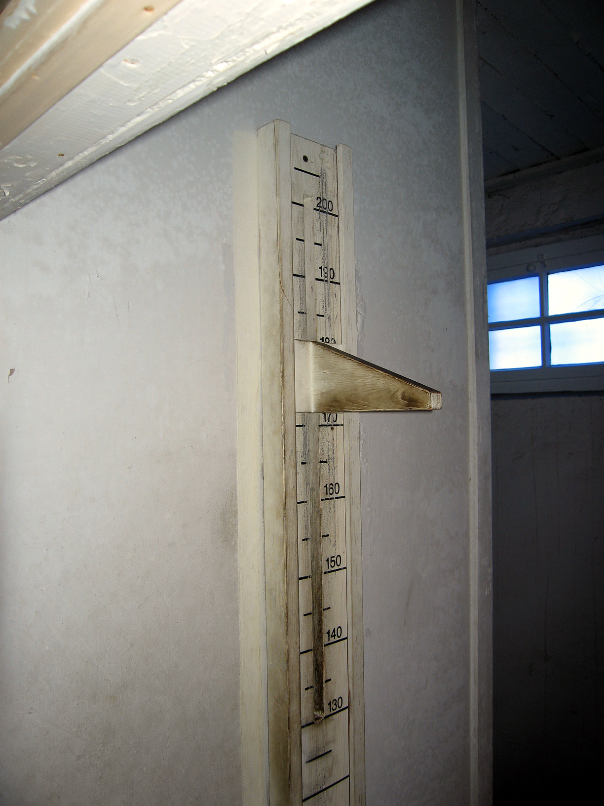 Vorderseite der Genickschussanlage (Detail) im KZ Buchenwald (Nachbau im Krematorium). Die Häftlinge wurden im ehemaligen Pferdestall zu einer ärztlichen Untersuchung einbestellt und beim Vermessen durch die Führung der Kopfplatte der Messanlage exekutiert.